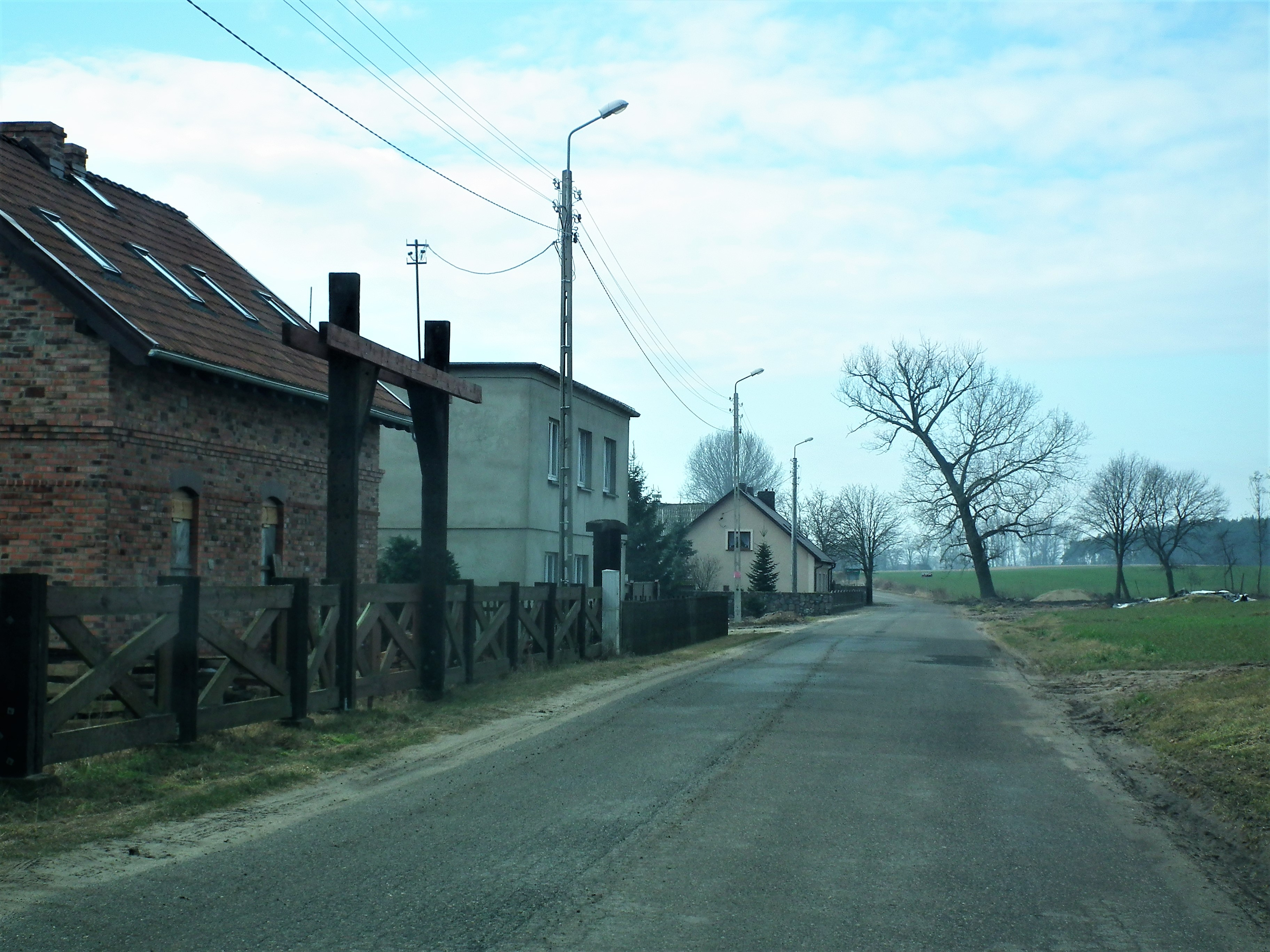 Roszkowo w gm. Czempiń.